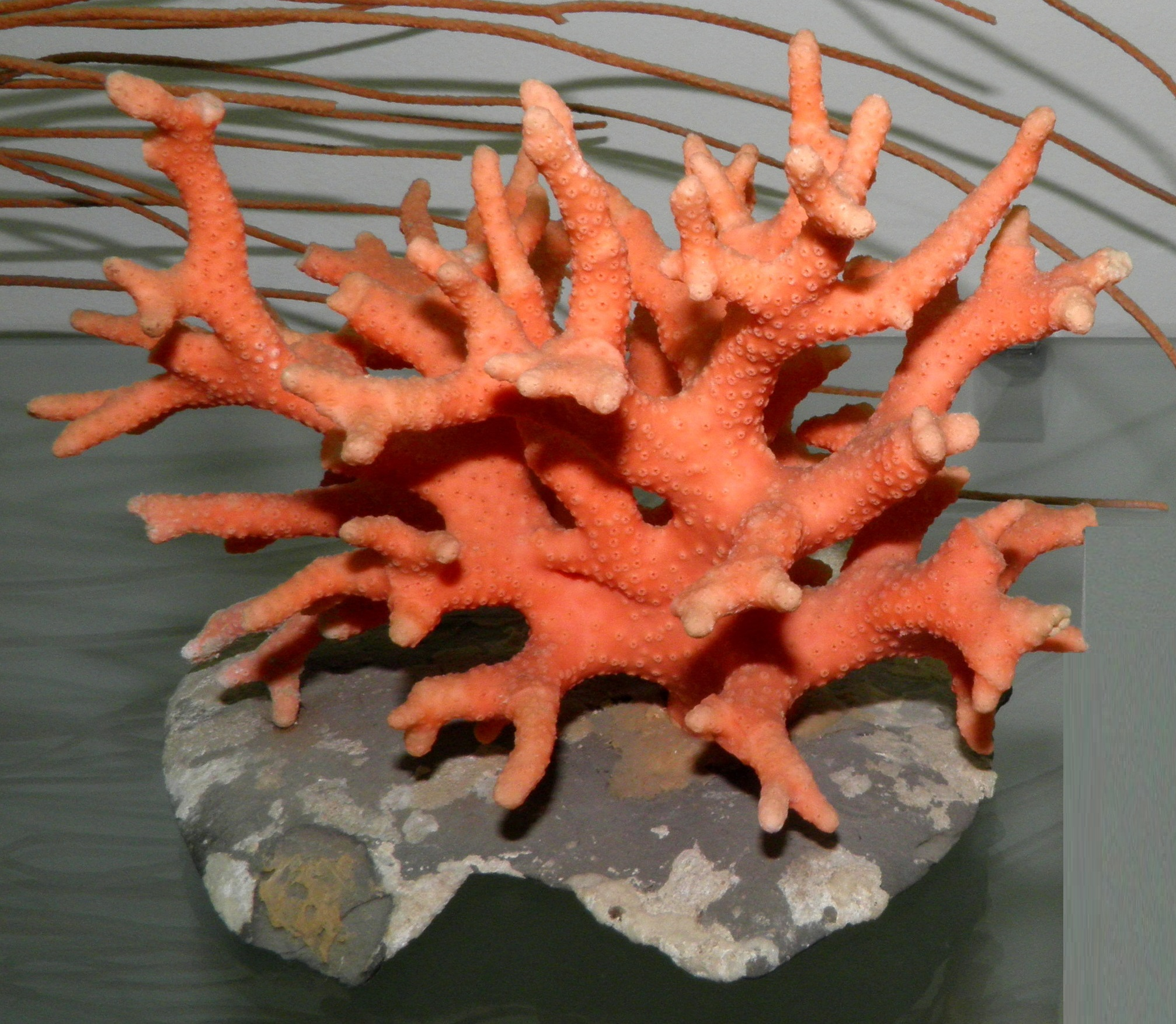 Errinopora stytifera в океанариуме Владивостока